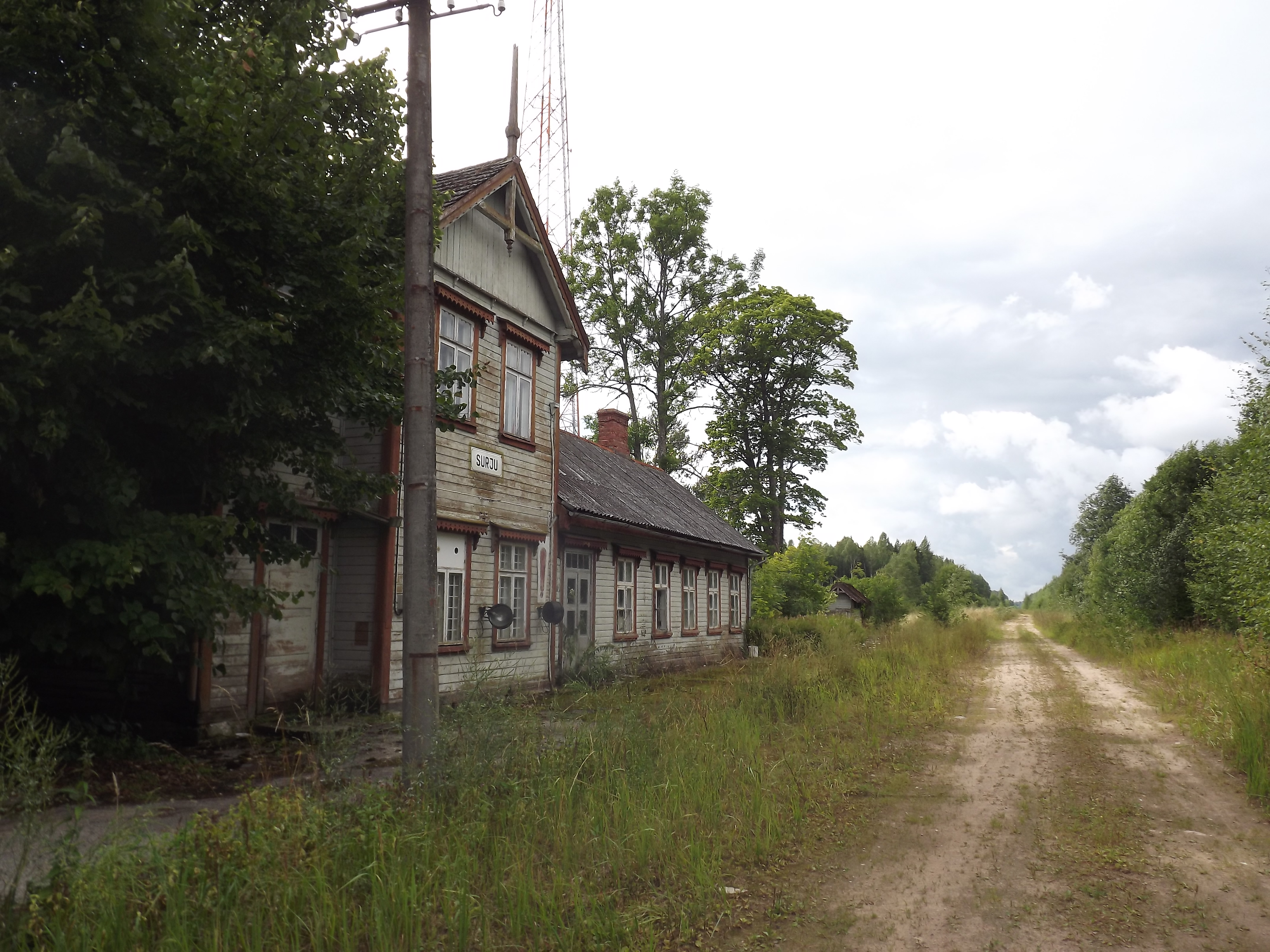 Surju raudteejaam